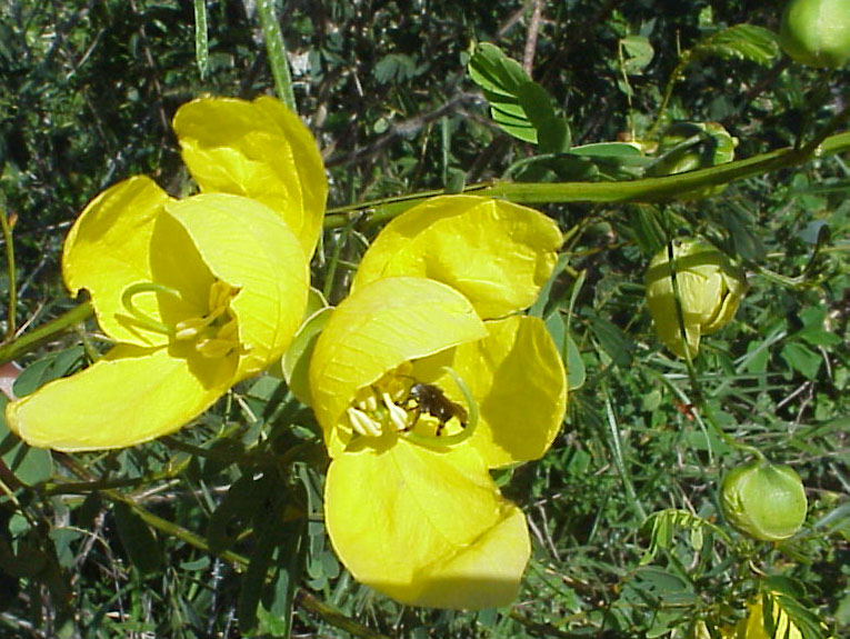 Leguminosae, Caesalpinioideae, encontrada no litoral brasileiro